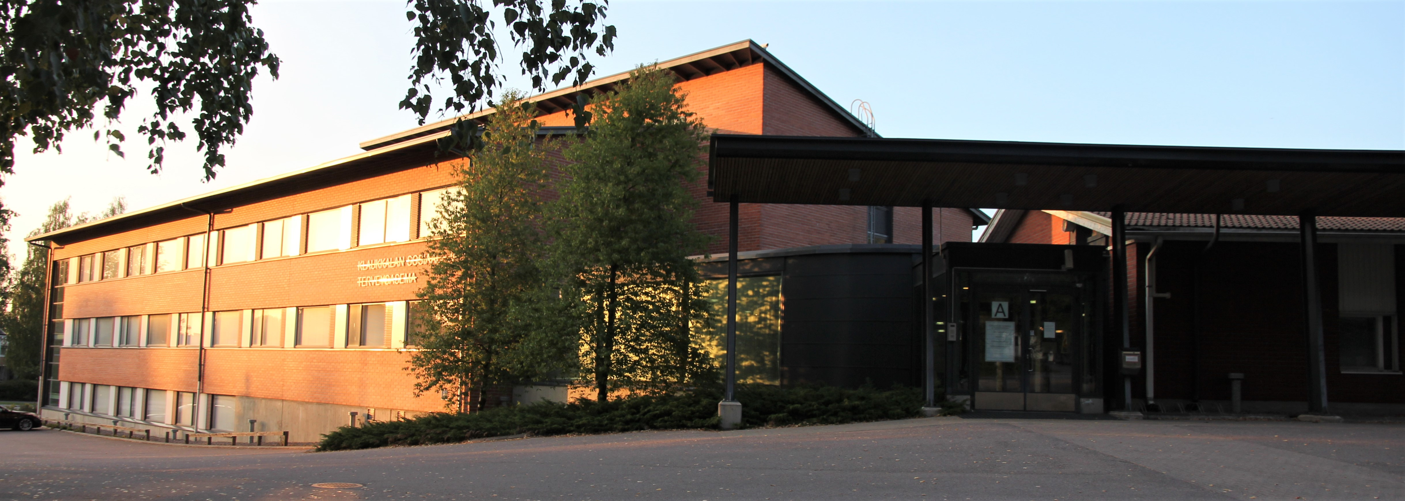 Klaukkalan terveysasema on Nurmijärven Klaukkalassa toimiva julkisen palvelun terveysasema. Kuvan oikeassa osassa on rakennuksen A-porras, B- ja C-portaat jäävät kuva-alueen oikealle puolelle. Terveysaseman osoite on Vaskomäentie 2, 01800 Klaukkala (Nurmijärvi).